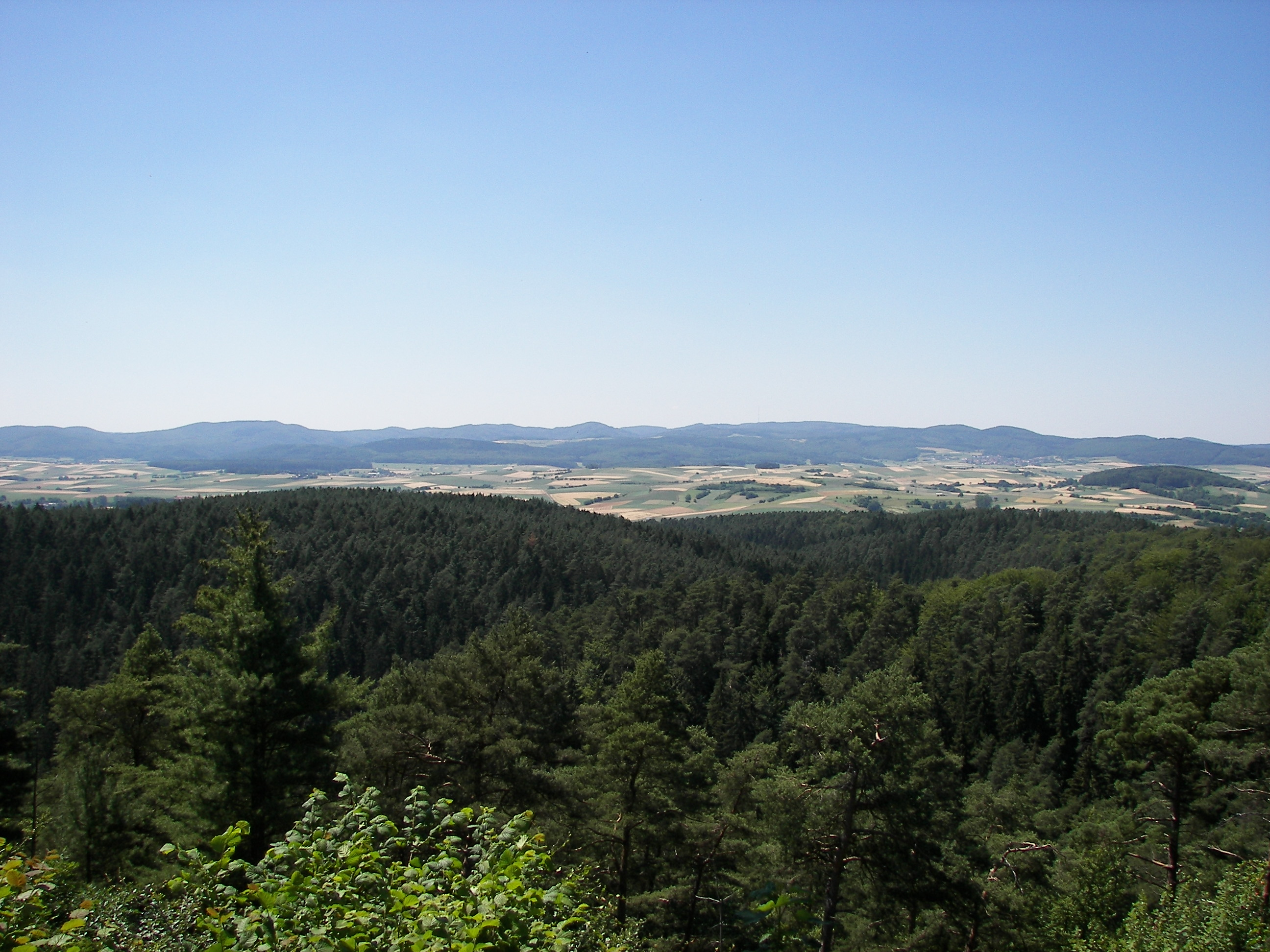 Burgwald, Blick ins Wetschaftstal, vom Christenberg aus gesehen; im Hintergrund die Sackpfeifen-Vorhöhen im Rothaargebirge mit Kohlenberg (583 m, halbrechts, zweigipfelig), Sackpfeife (674 m, rechts der Mitte, sehr breit, mit Sendemast), Hainpracht (631 m, links davon im Hintergrund), Hassenroth (622 m, Mitte, kuppig) und Arennest (592 m, halblinks)